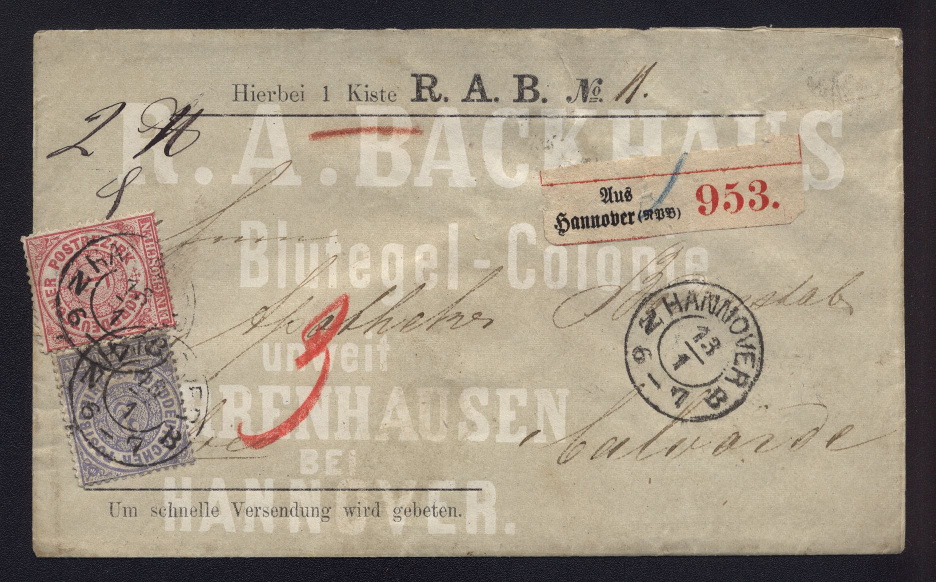 Mit zwei Briefmarken von insgesamt 3 Groschen des Norddeutschen Postbezirks austaxierter und frankierter, am 13. Januar 1870 gestempelter Paketbegleitbrief der „R. A. Backhaus Blutegel Colonie unweit Herrenhausen bei Hannover“ mit Vordruck „Hierbei eine Kiste R. A. B. Nr. 1“ versandt an den Apotheker Friedrich Wilhelm Bodenstab in Calvörde , unten mit dem Hinweis „Um schnelle Versendung wird gebeten.“ Auf der Rückseite - oberhalb dem Siegel mit dem Wappen des Unternehmens - der handschriftliche Vermerk in blau „Helmstedt“ möglicherweise als Umspeditionsvermerk, sowie eine handschriftlich in rot aufgebrachte 6, möglicherweise 6 Pfennig Bestellgeld. Zudem der Ankunftsstempel des Postamtes von Calvorde des Folgetages, dem 14. Januar 1870 ...